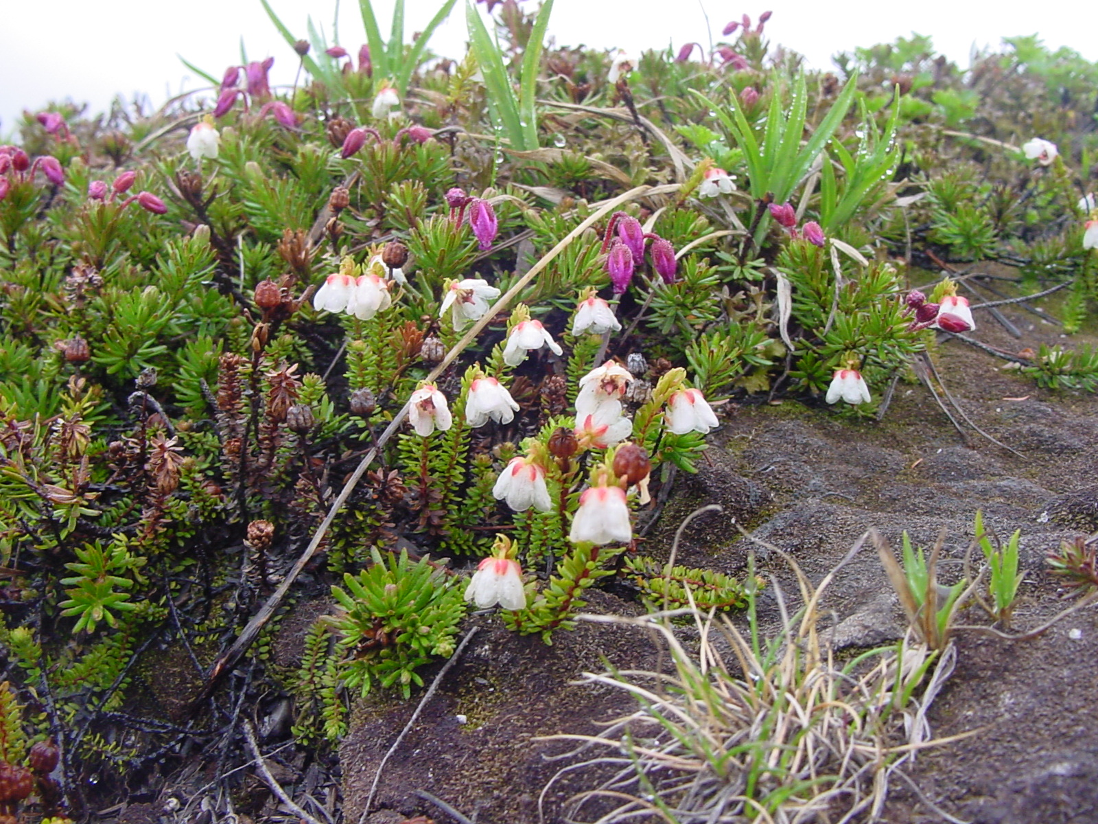 エゾノツガザクラ[蝦夷の栂桜][Phyllodoce caerulea](奥)&ジムカデ[地百足][Ｈarrimanella stelleriana](手前)